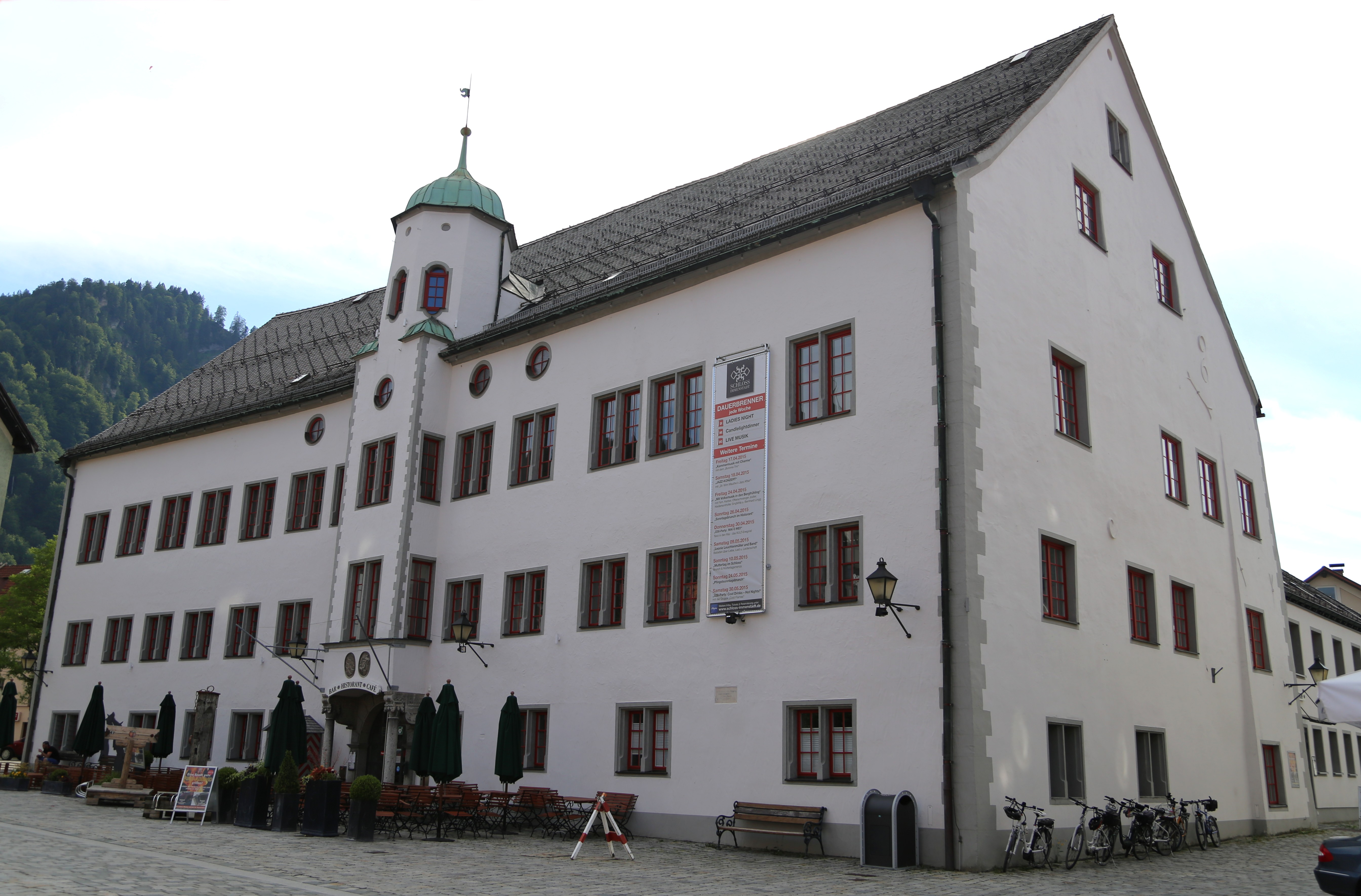 Marienplatz 12, Immenstadt; Ehemaliges Schloss, dreigeschossige Dreiflügelanlage mit Sattel- bzw. Walmdach und Erkern mit Haubendächern, Ostflügel um 1550 errichtet, 1604–20 verändert, Südflügel 17./18. Jahrhundert, Westflügel 1746.